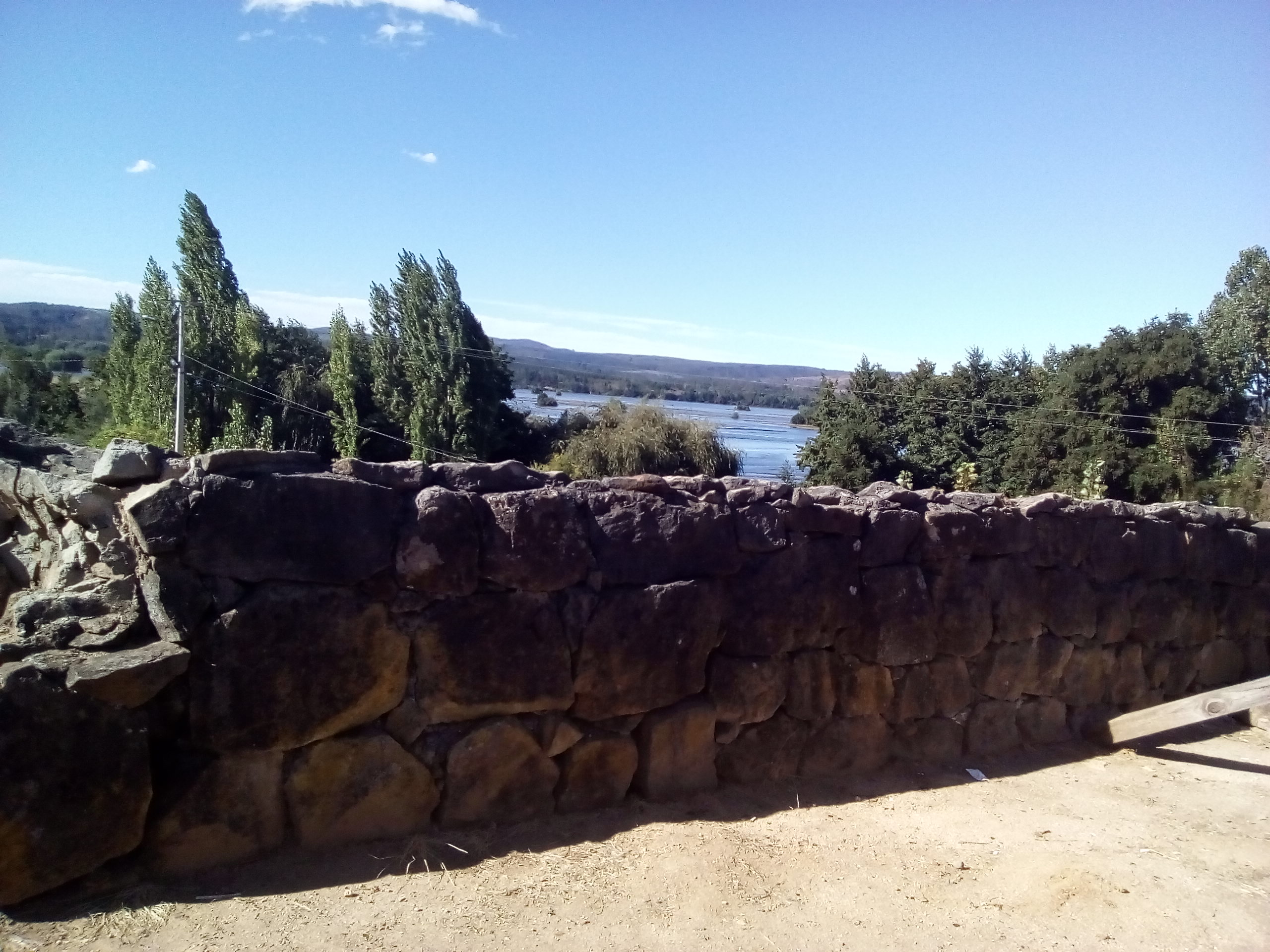 Distintas imágenes del Fuerte de Santa Juana y la laguna cercana.